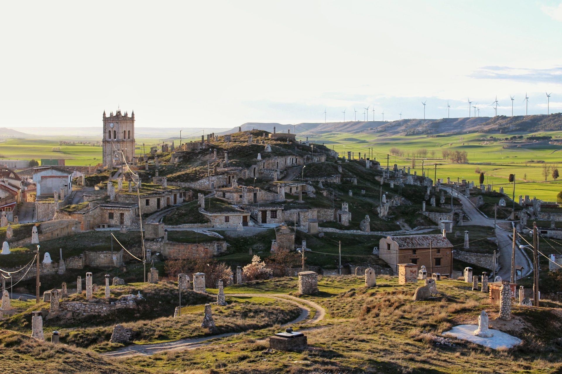 Cerro de las bodegas de Baltanás